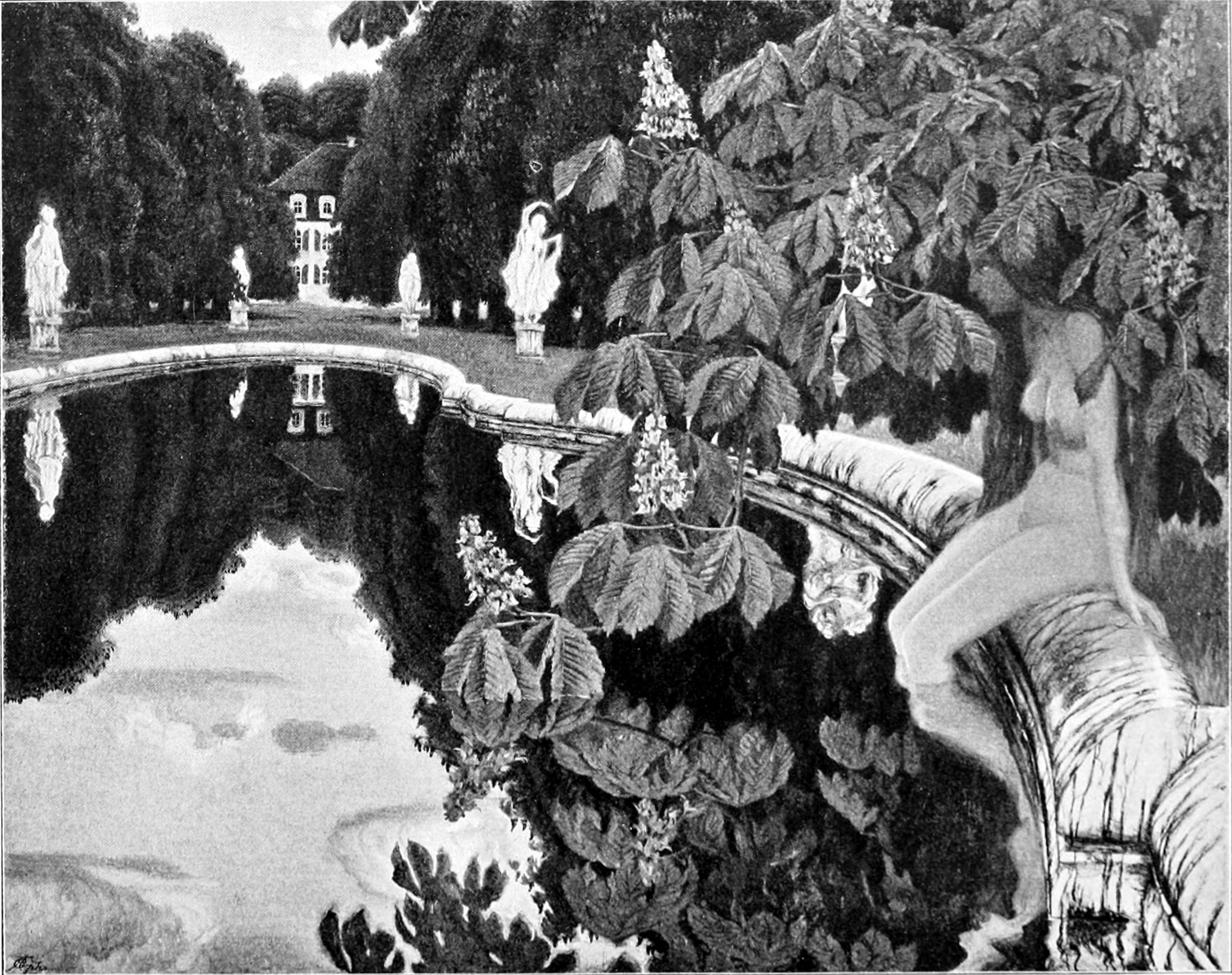 Mittagstunde